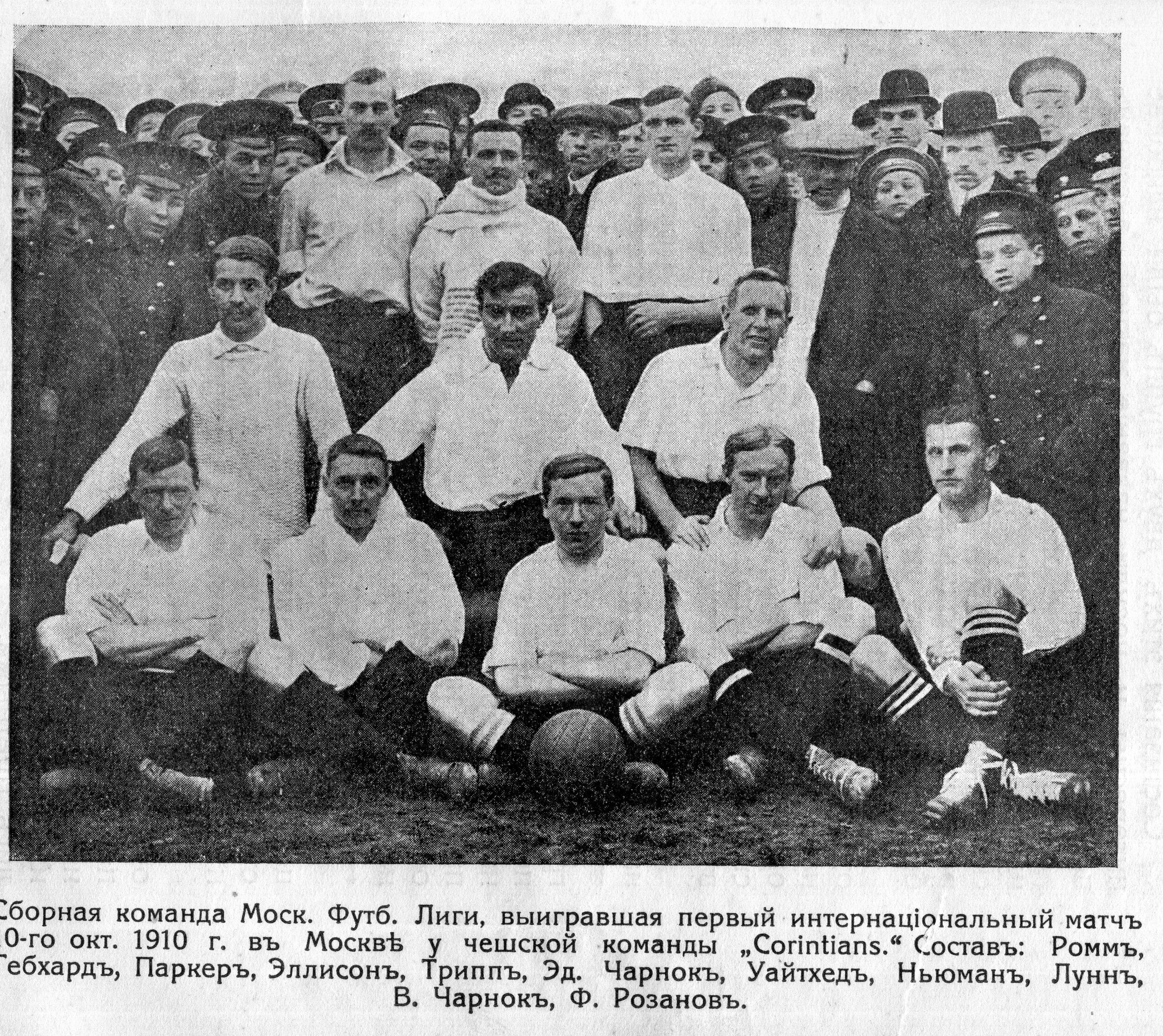 Сборная команда Московской футбольной лиги, выигравшая первый международный матч в 1910 г. у чешской команды "Коринтианс" Состав: Ромм, Гебхард, Паркер, Эллисон, Трипп, Эд. Чарнок, Уайтхед, Ньюман, Лунн, В. Чарнок, Ф. Розанов.